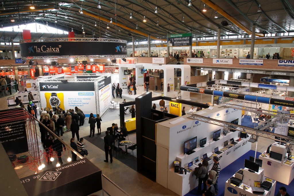 la fira multisectorial més important del nostre calendari firal que se celebra el mes d'octubre